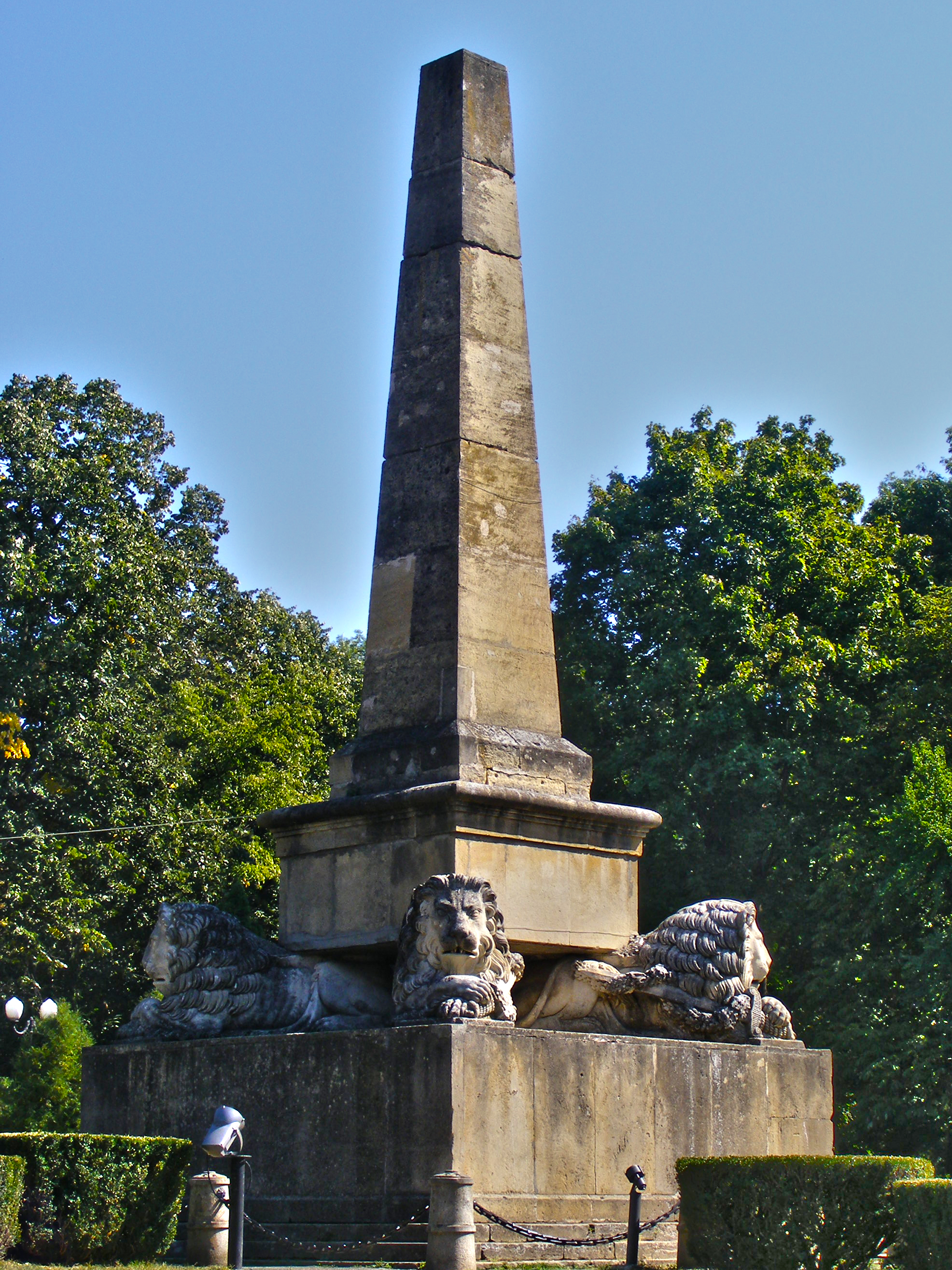 Obeliscul leilor, Grădina Copou